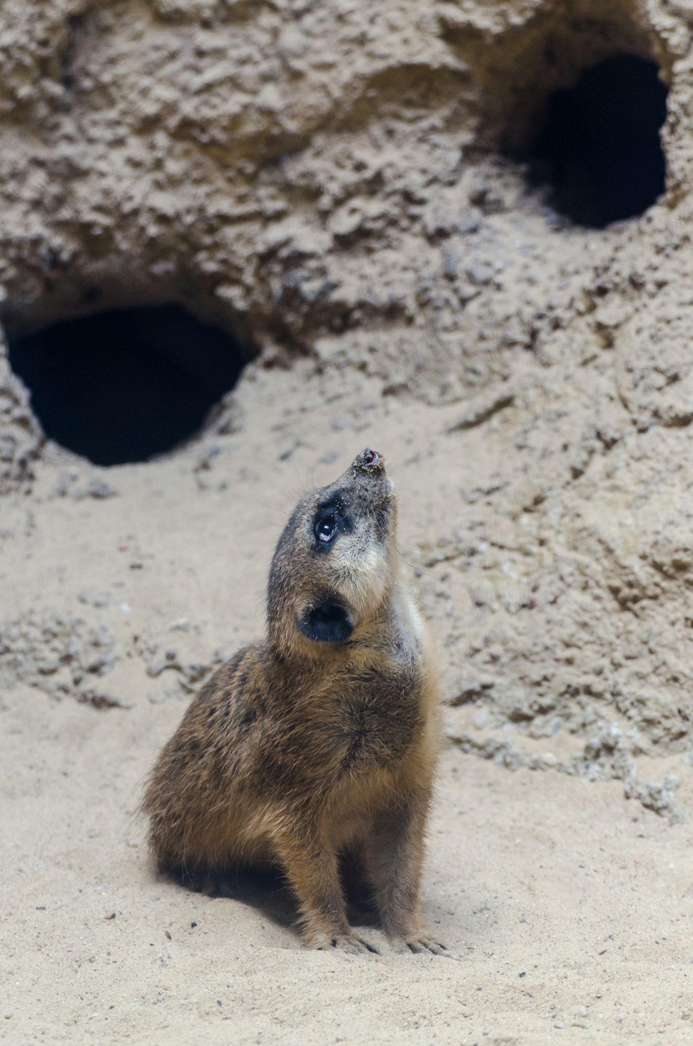 500px provided description: Alles Gute kommt von oben? [#Erdm?nnchen ,#S?ugetiere ,#W?ste ,#HighKey ,#?ffentliche Anlagen ,#Zoo-Besuch ,#Zoologischer G.]